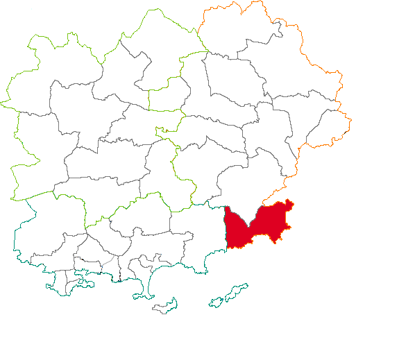 Situation du canton dans la département du Var (83), France